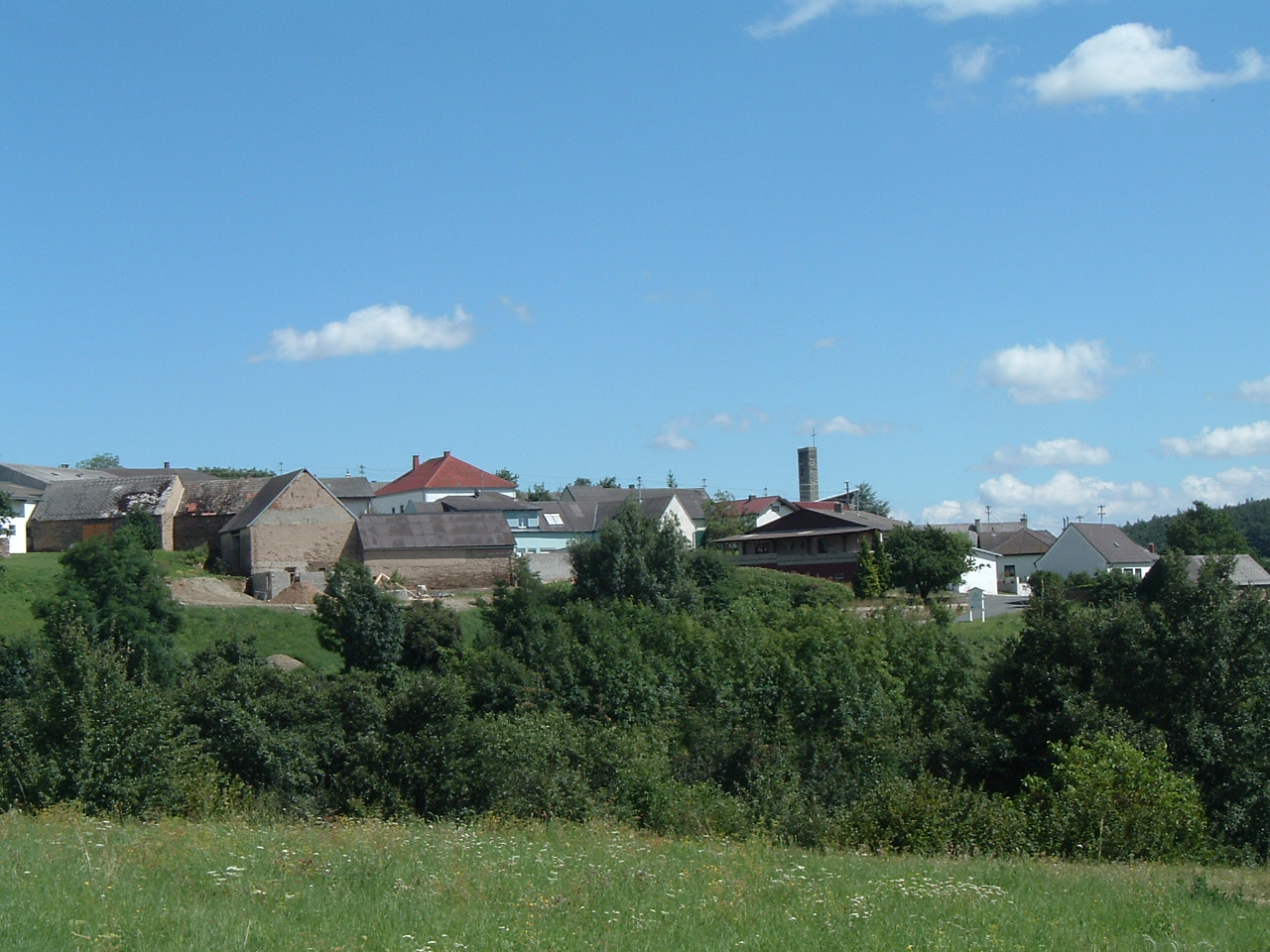 Althodis, Burgenland, Austria